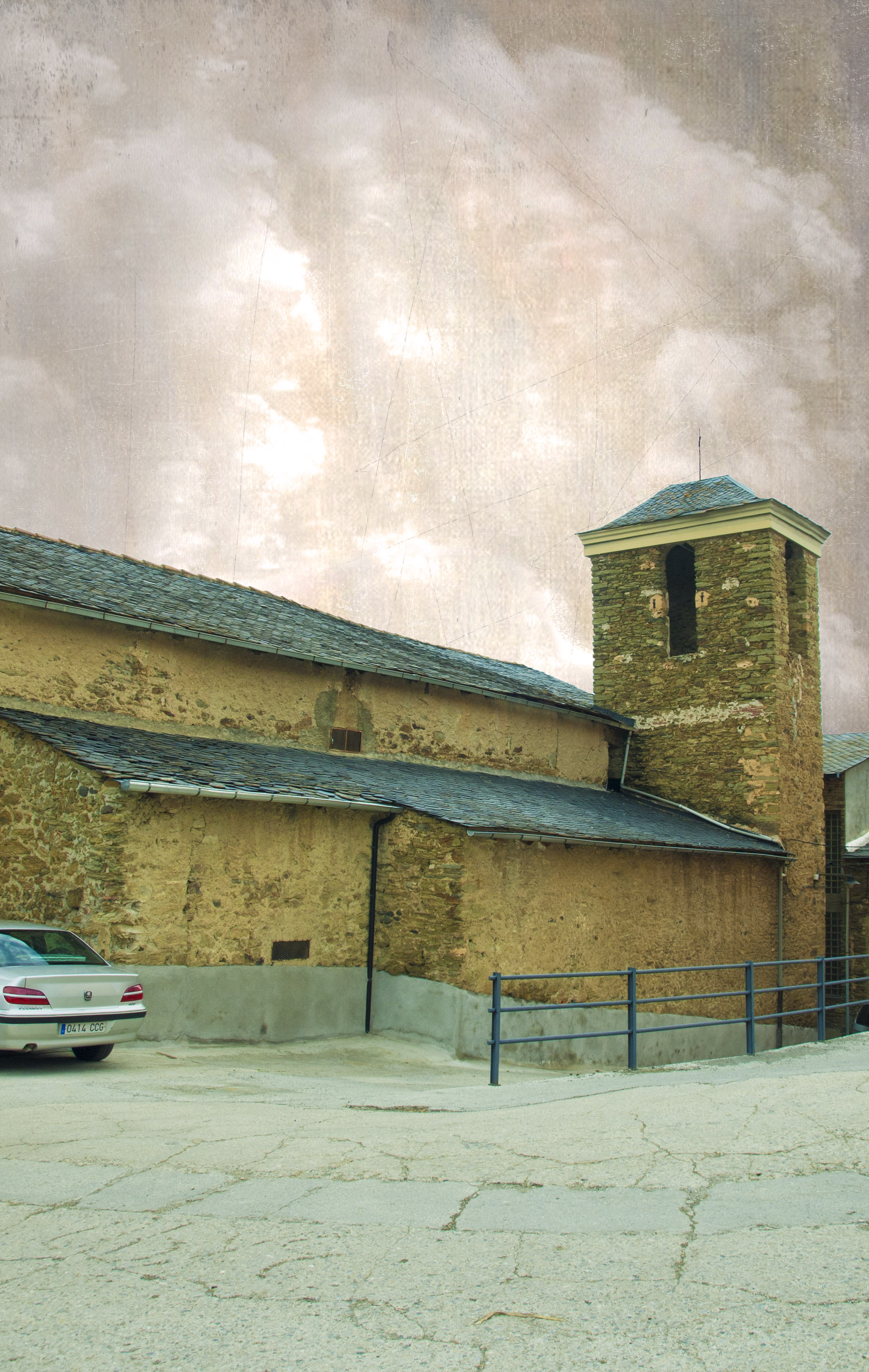 Fotografia de l'església de Sant Feliu, al nucli de Castelllciutat del municipi de la Seu d'Urgell, a l'Alt Urgell Textura de Lenabem-Anna